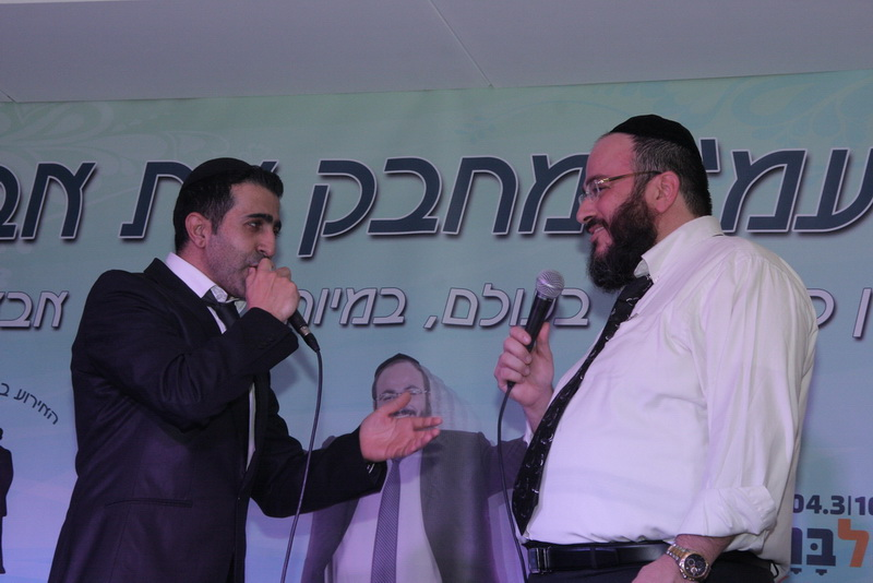 בתמונה: עמי מימון , אמיר אליהו